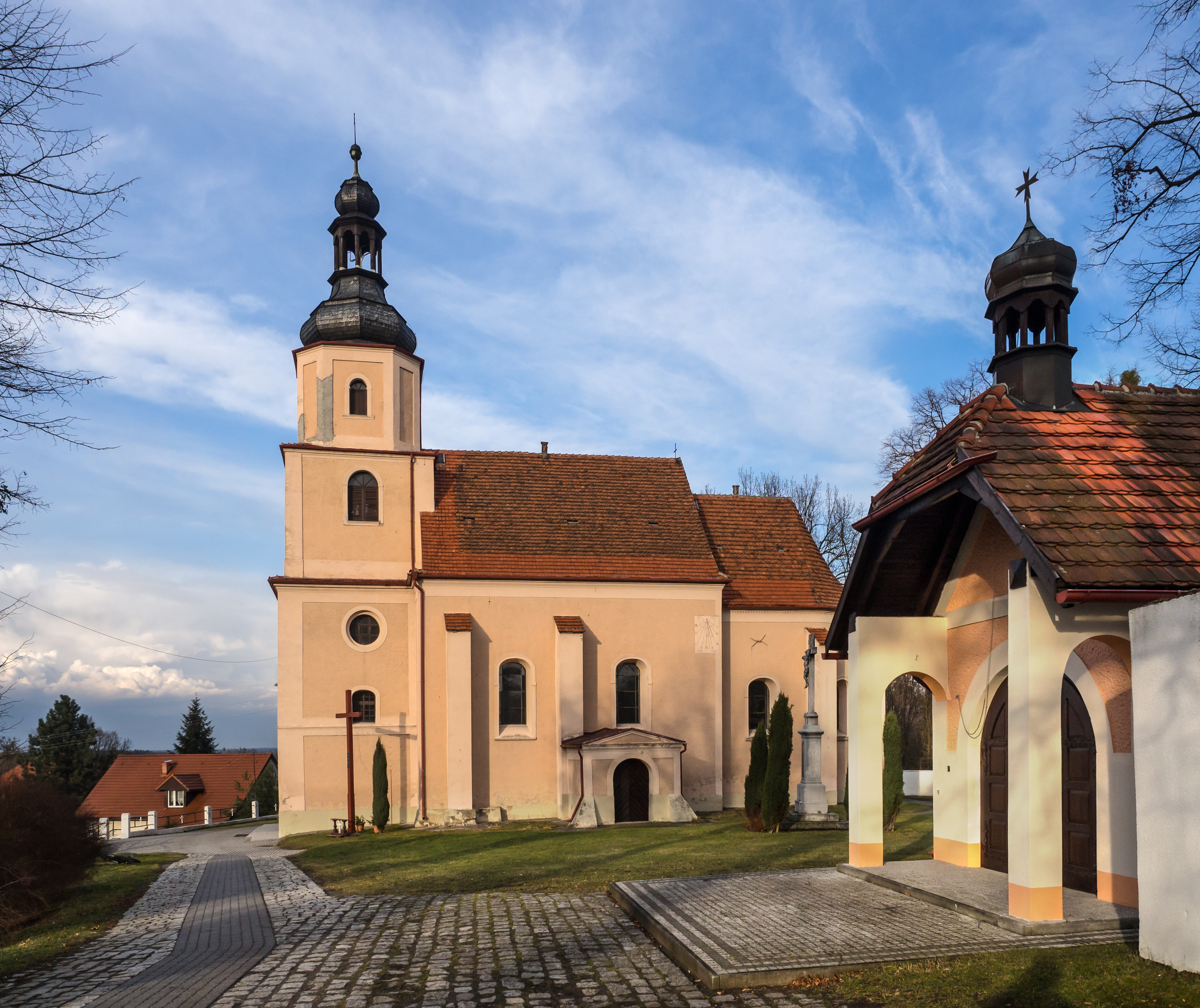 Dąbrowa, kościół par. p.w. św. Wawrzyńca, XVII, 1833